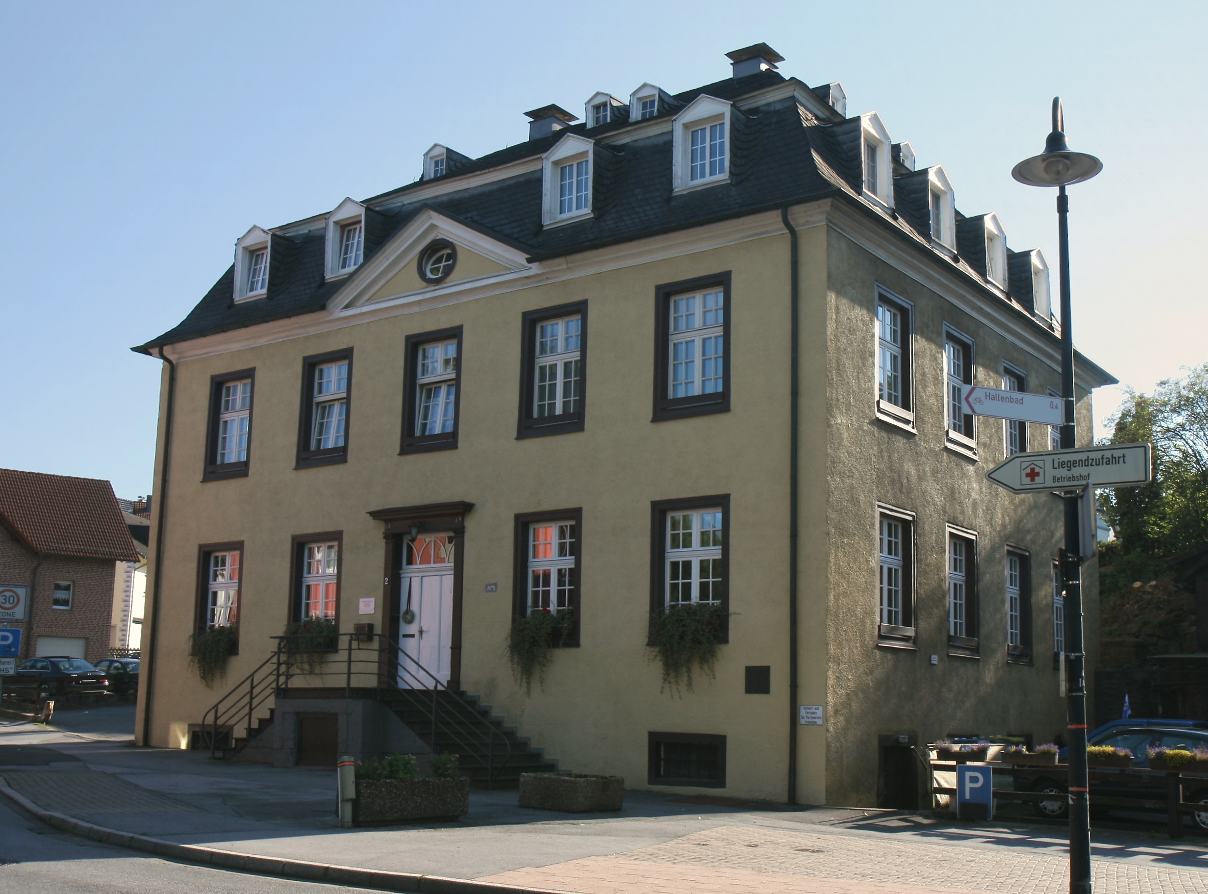 Balve, Dechant-Amecke-Weg 2, Wohnhaus. Denkmal seit 26. Januar 1984, Nr. 8. Patrizierhaus, erbaut 1812 bis 1819. 1830 bis 1900 Sitz der Verwaltung des Amtes Balve.